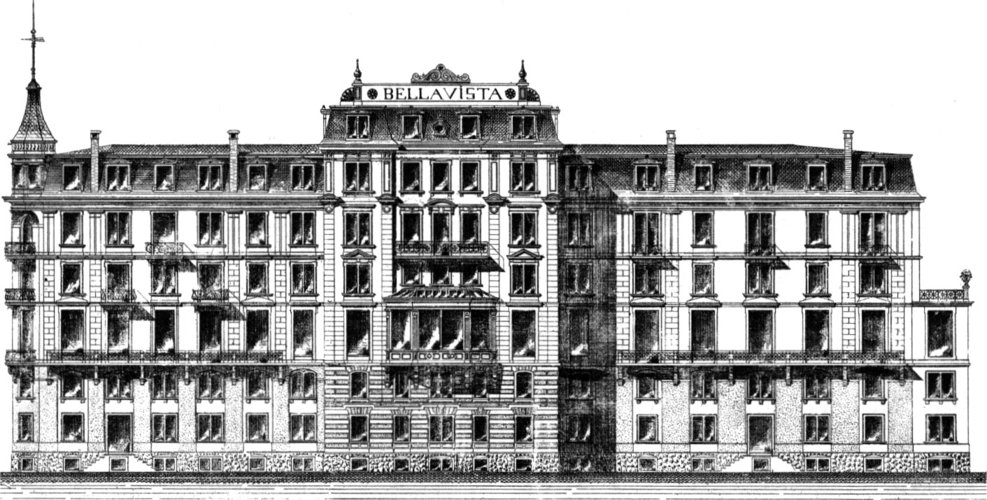 Pontresina - Hotel Kronenhof und Bellavista, Fassadenentwurf Gebrüder Ragaz 1896